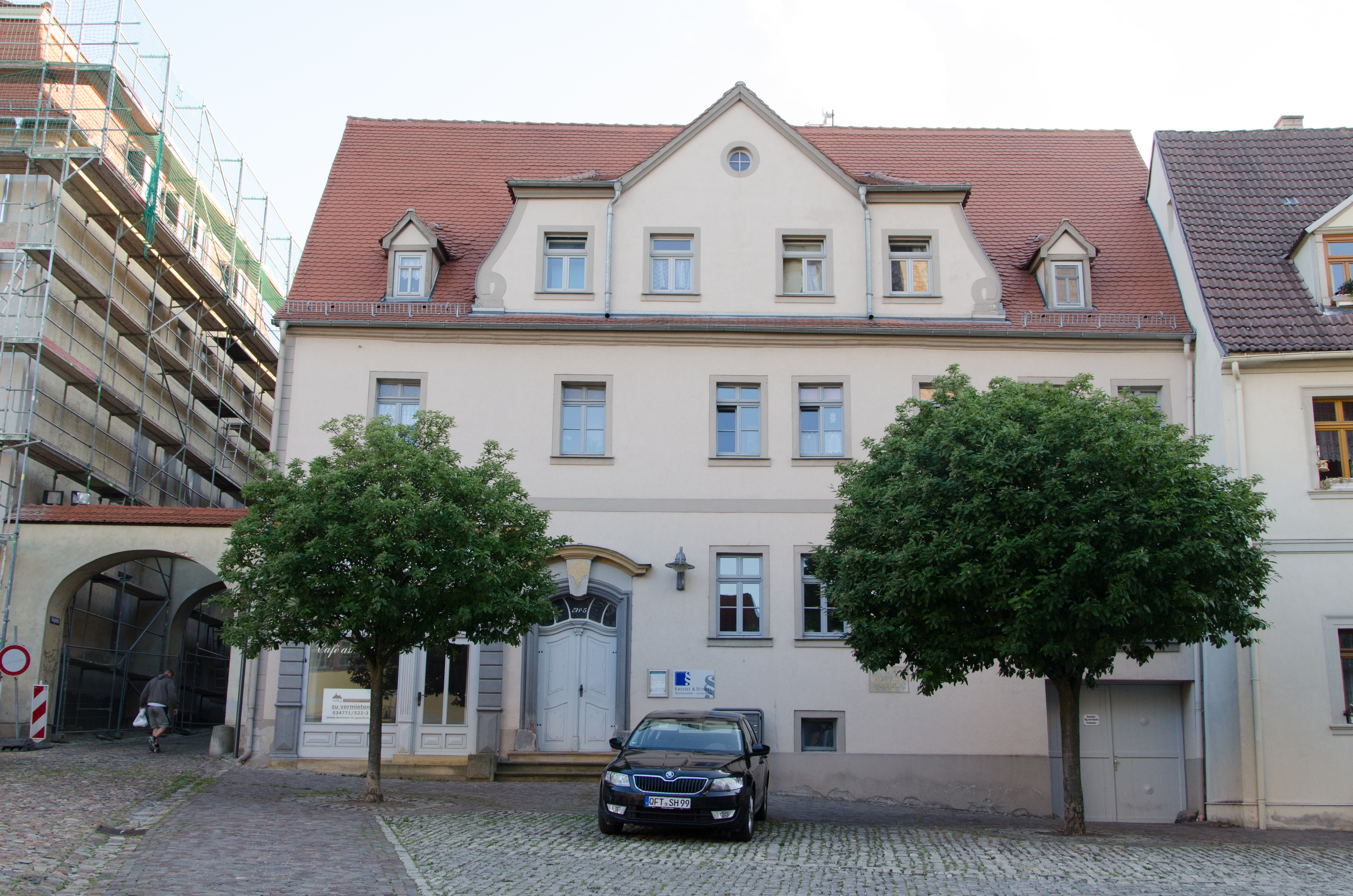 Querfurt, Markt 5